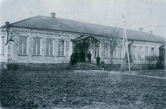 Здание первой гимназии города Светлограда